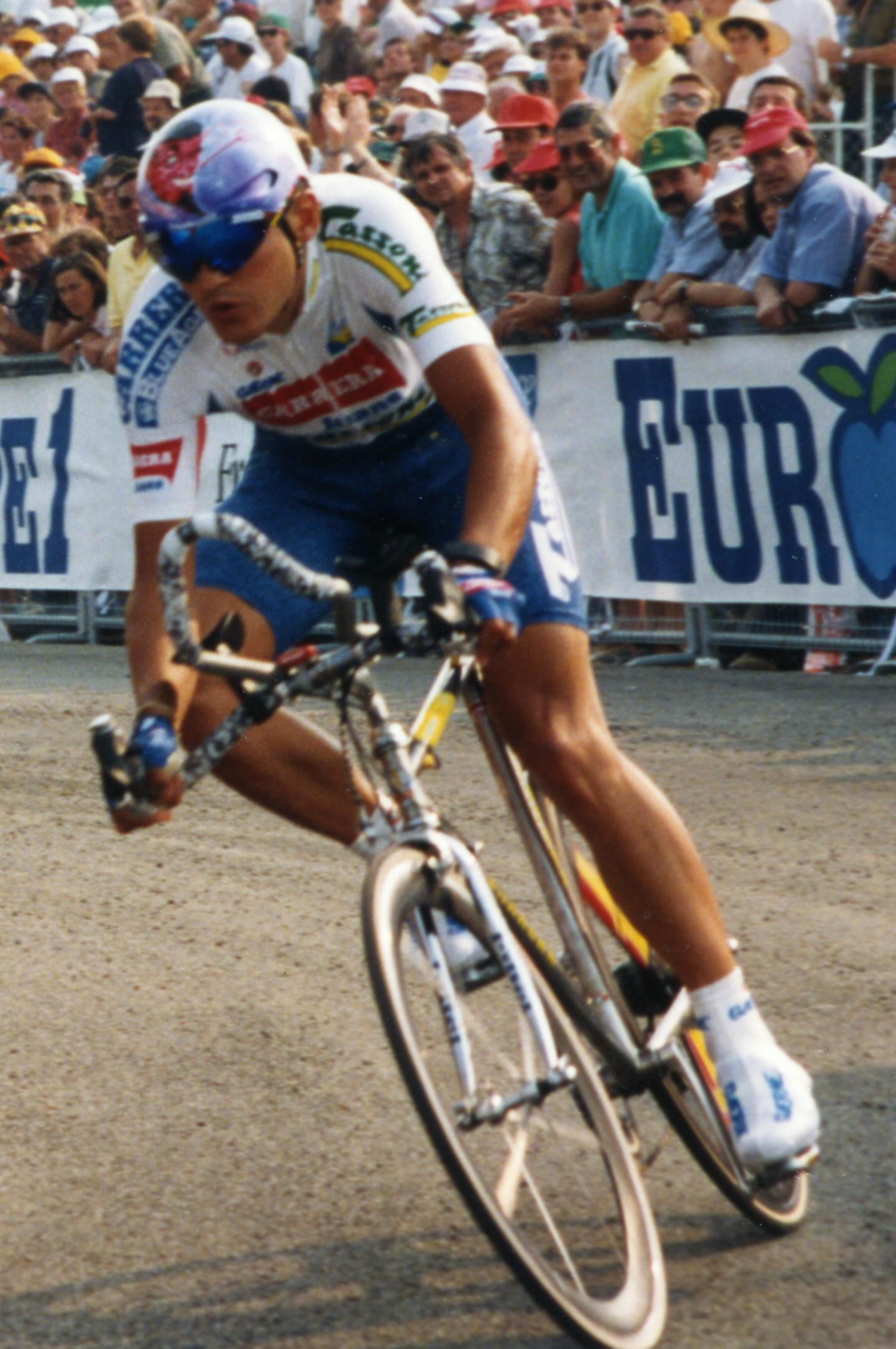 TOUR DE FRANCE 1993